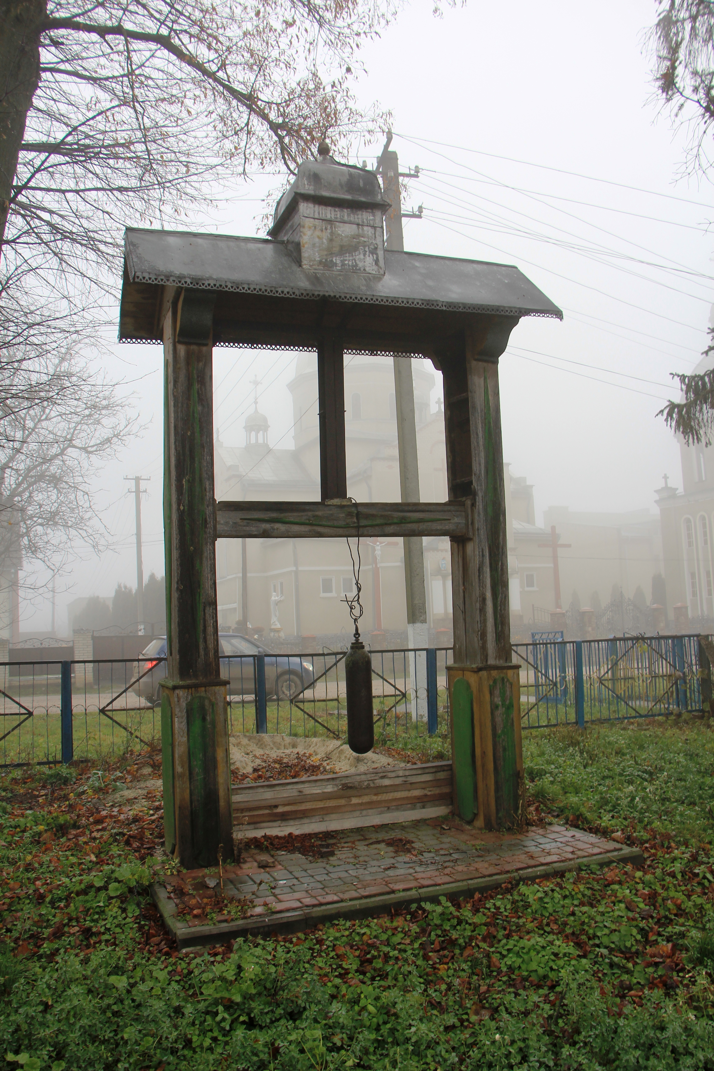 Церква св. Параскеви Терновської 1860 (дзвіниця)